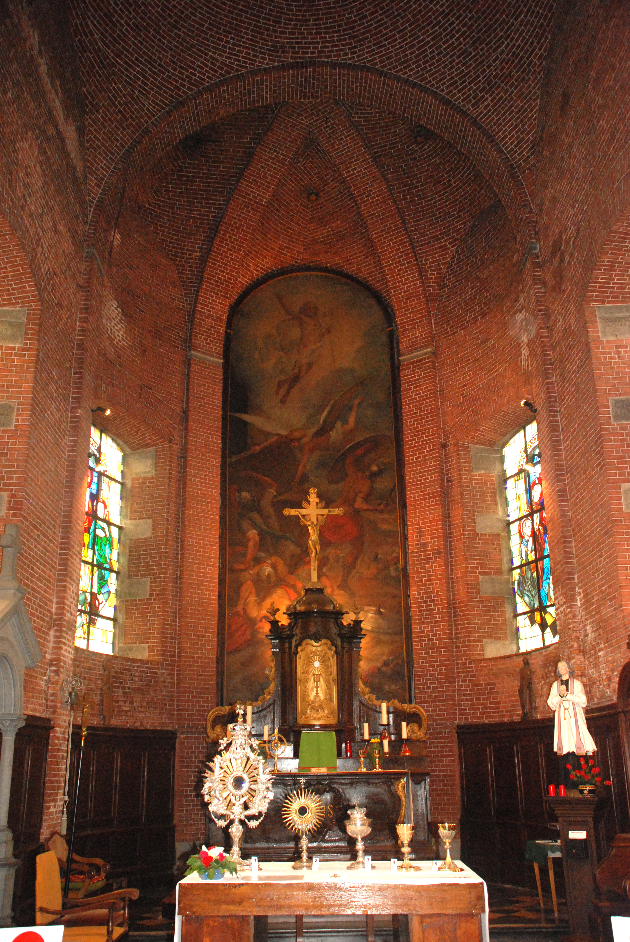 Belgique - Brabant wallon - Genappe - Baisy-Thy - Église Saint-Hubert